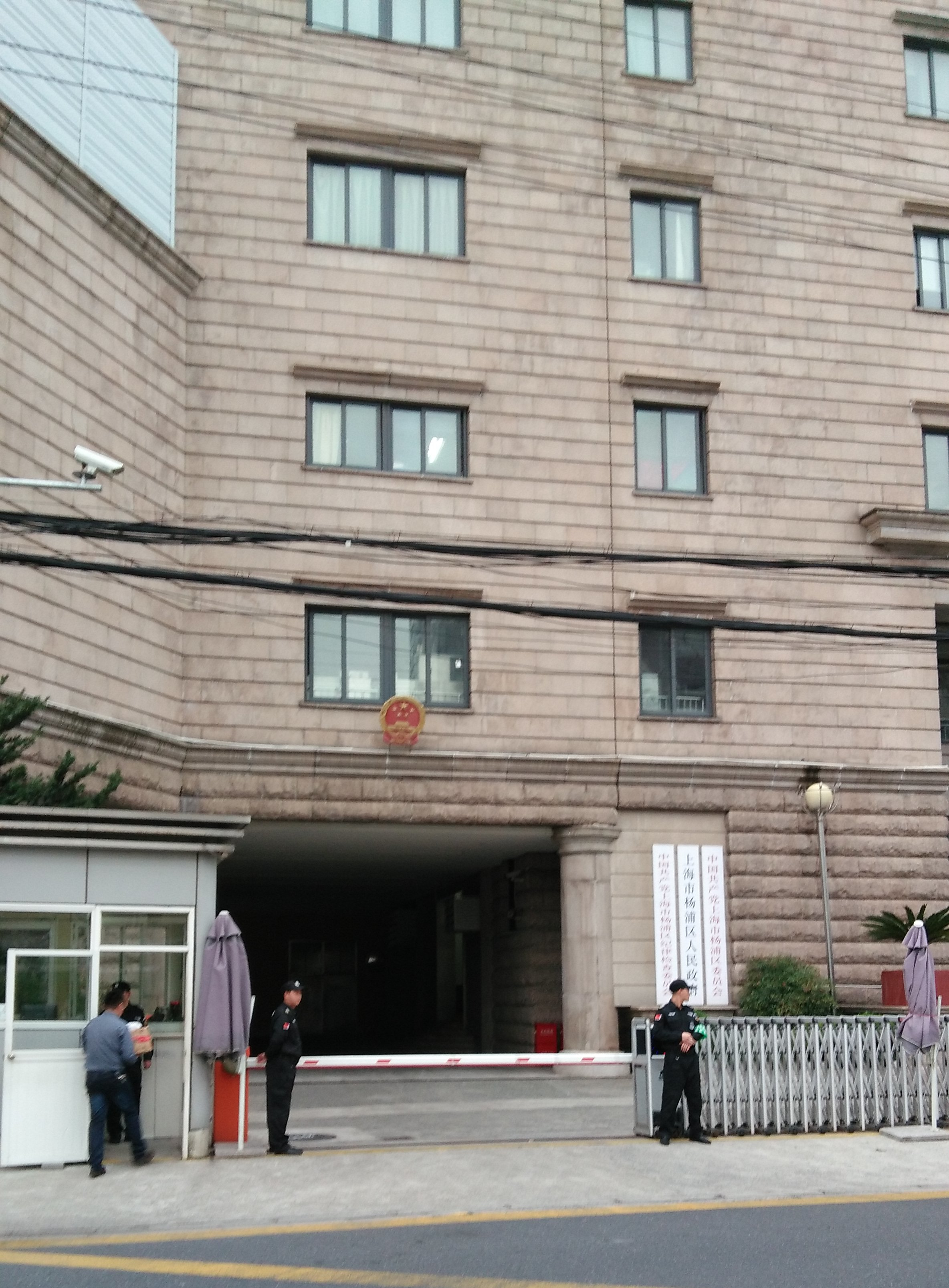 上海市楊浦區政府大樓。